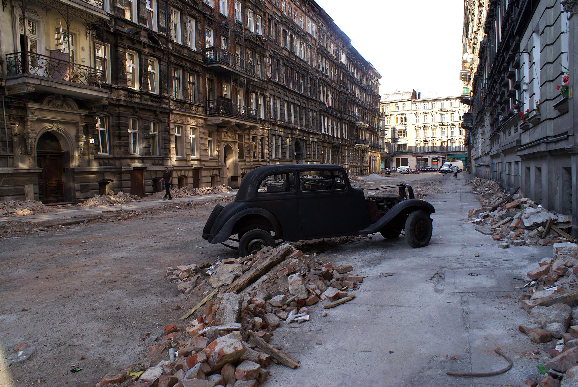 Wrocław, układ urbanistyczny Przedmieścia Oławskiego, XIII, XIX